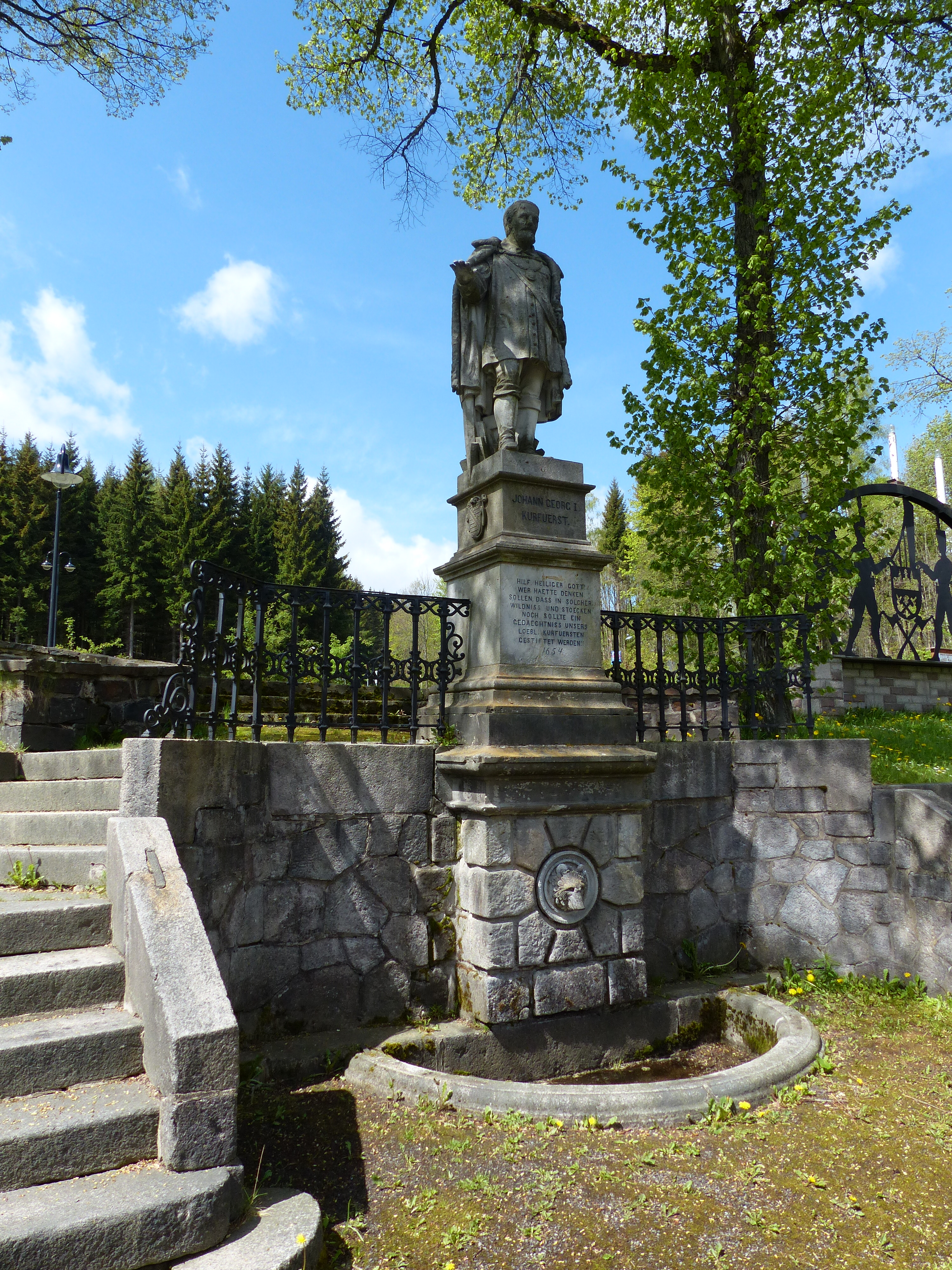 Ansicht von Johanngeorgenstadt